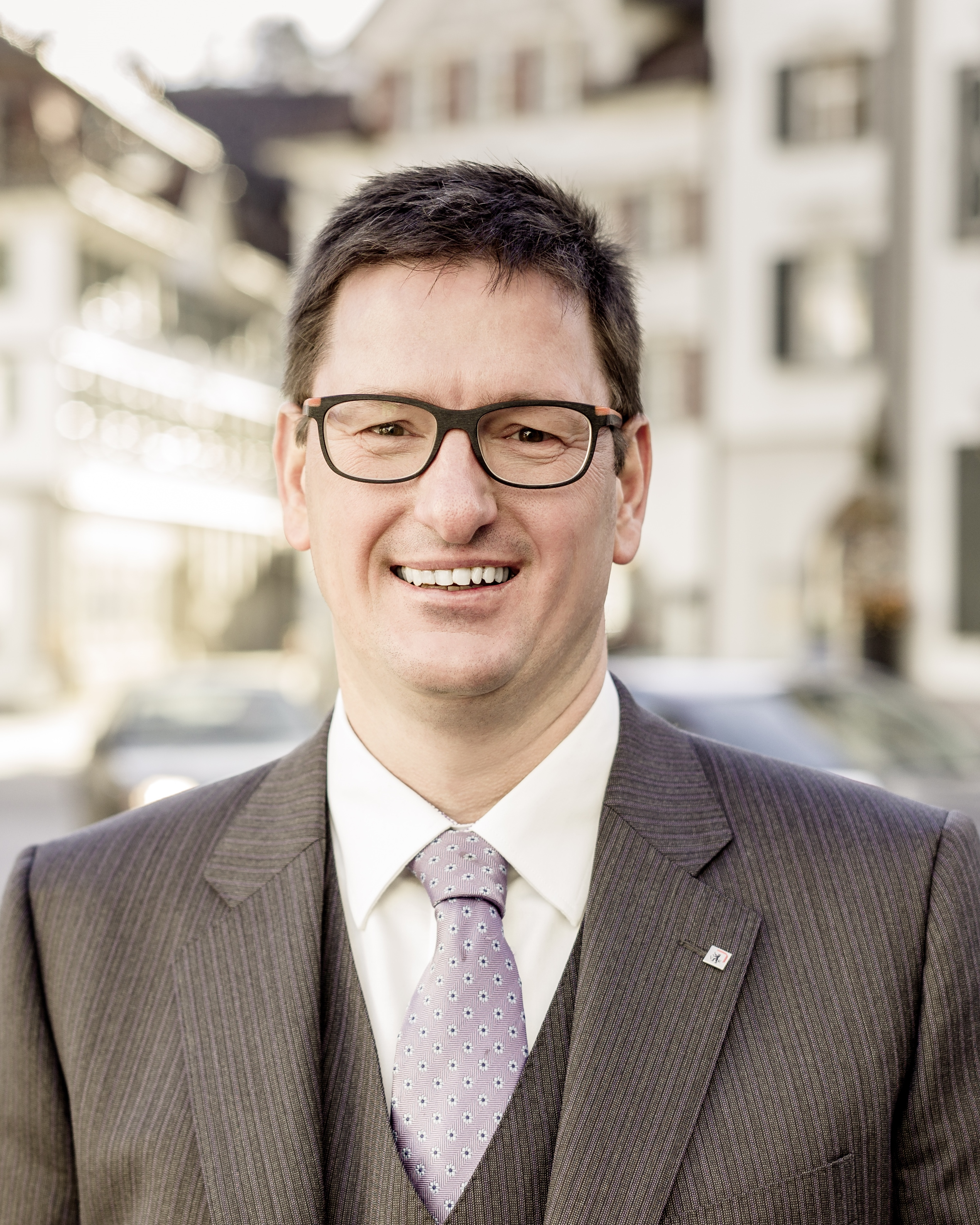 Herisau im Dez. 2014